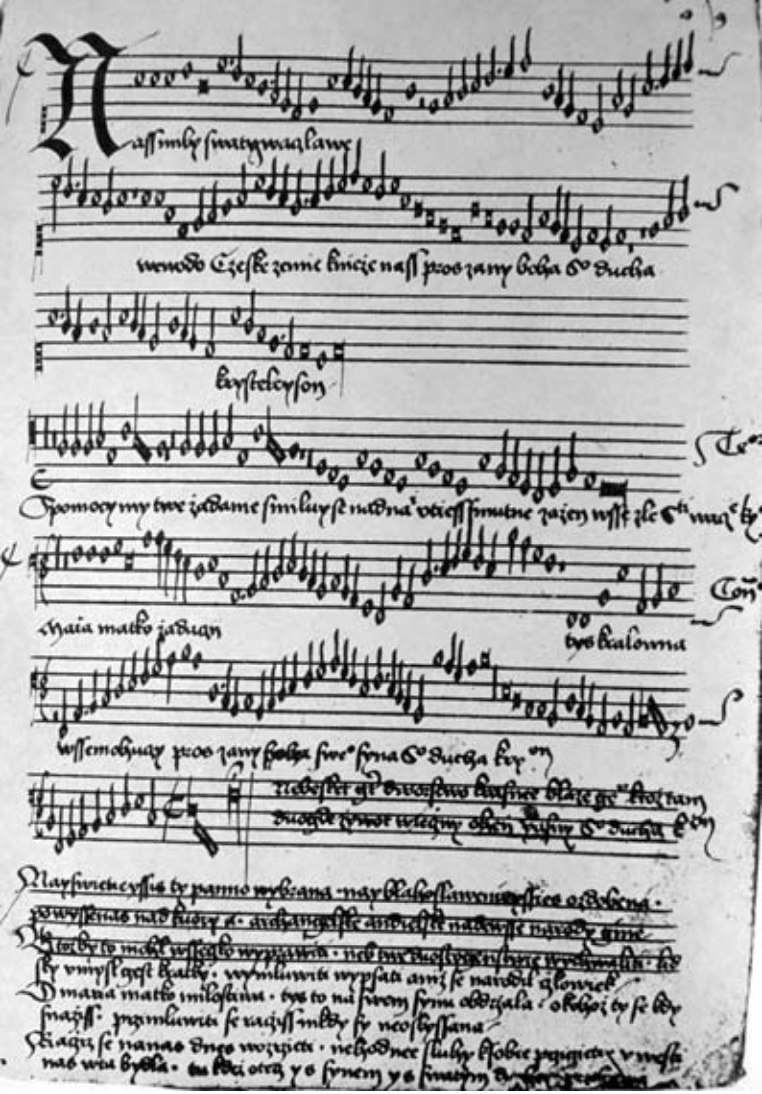 Motette über das Sankt-Wenzels-Lied Náš milý svatý Václave im Codex Speciálník (Böhmen, um 1500)